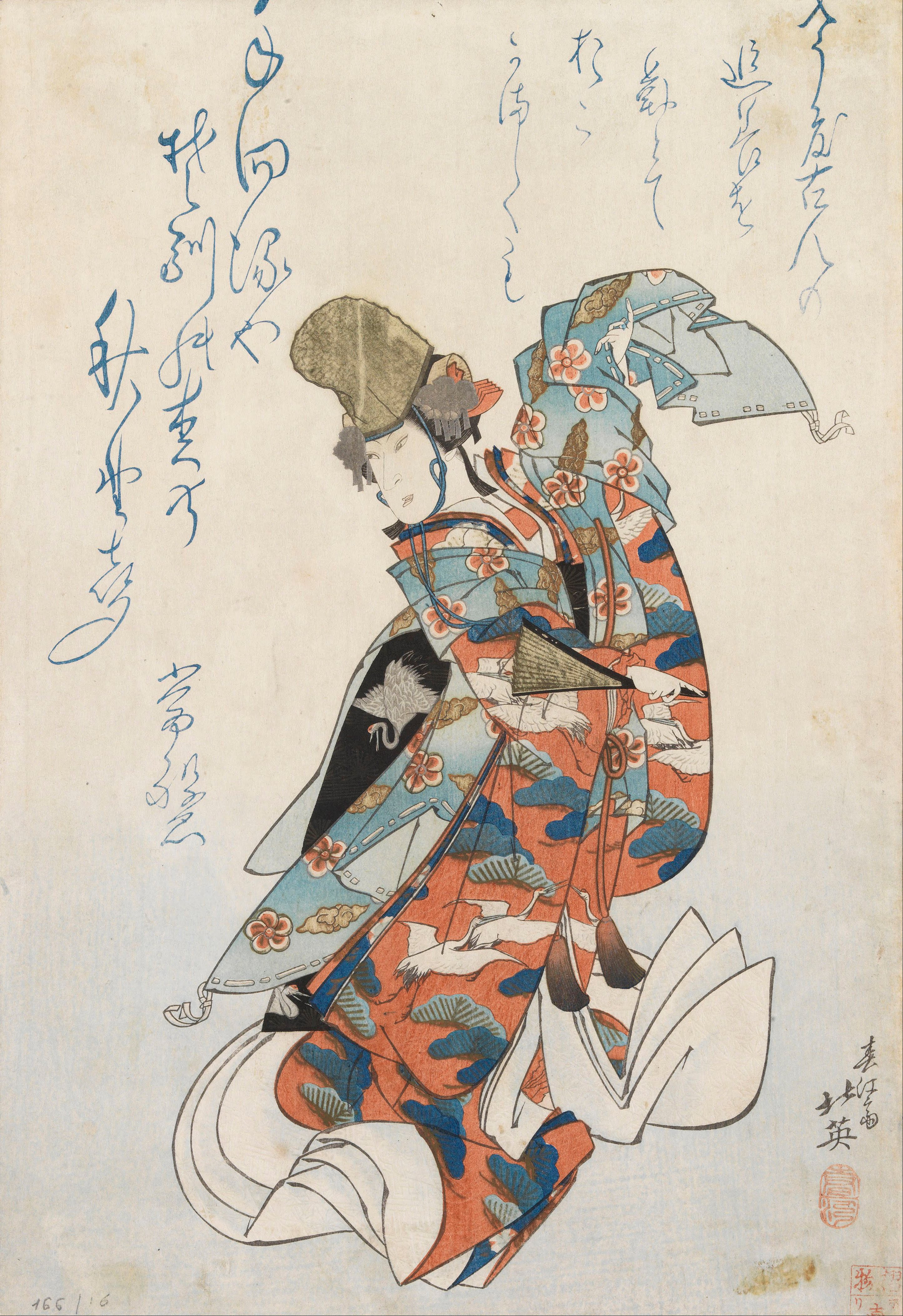 Nakamura Matsue III (later Nakamura Tomijūrō II)